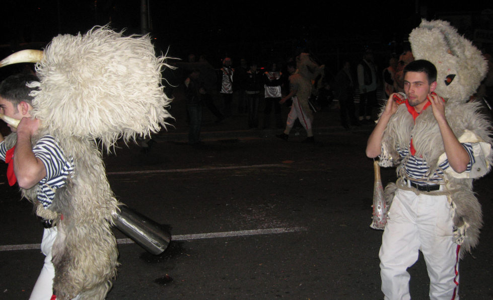 Halubajski zvoncari (Bellmen from Halubje, Croatia